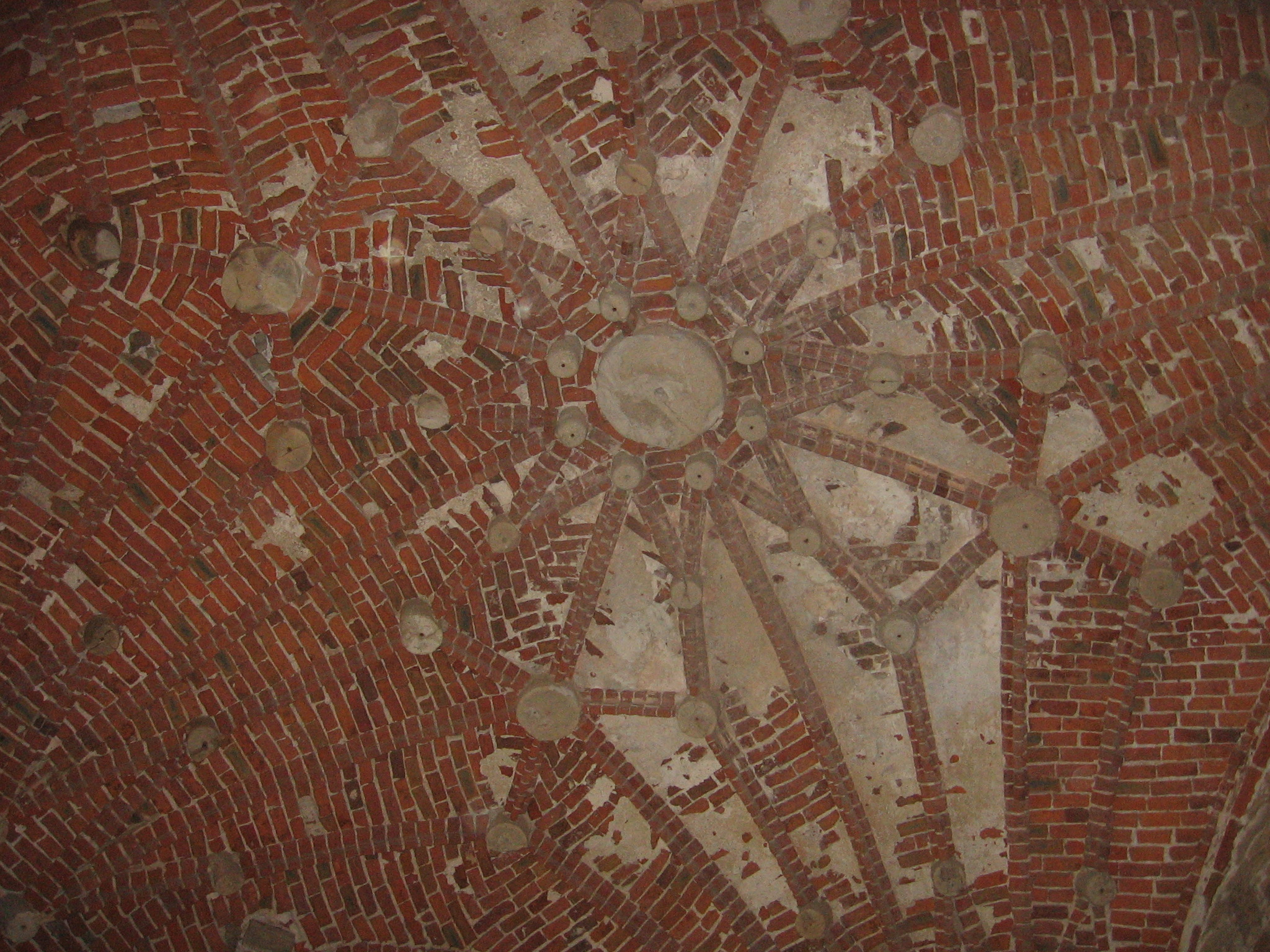 Ordumeistri eluruumi lagi Võnnu ordulinnuses